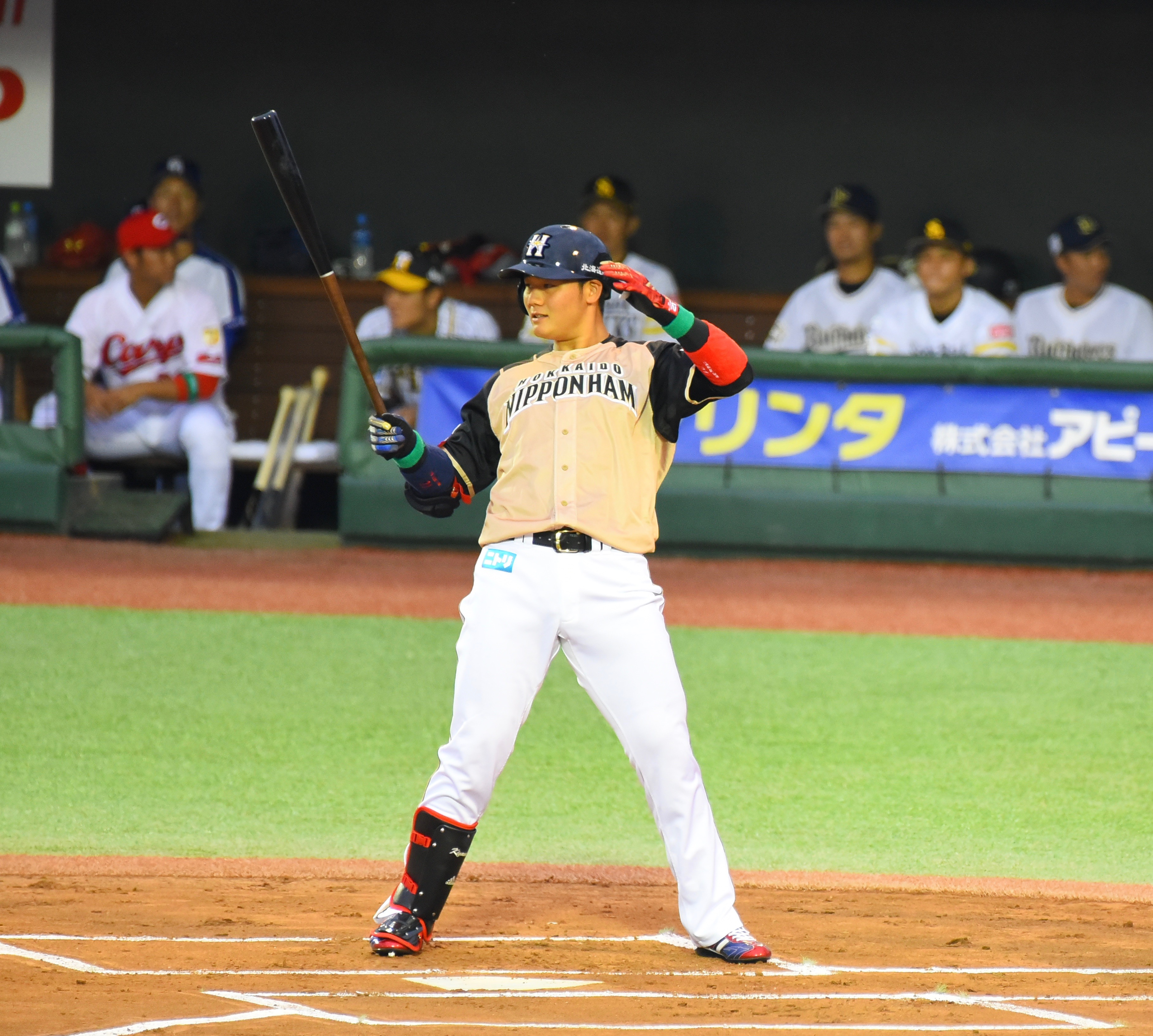 北海道日本ハムファイターズ 清宮幸太郎 2018年7月12日 はるか夢球場